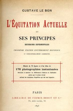 Титульная страница 3-го издания 1895 года книги "Настоящий конный спорт" Гюстава Лебона.